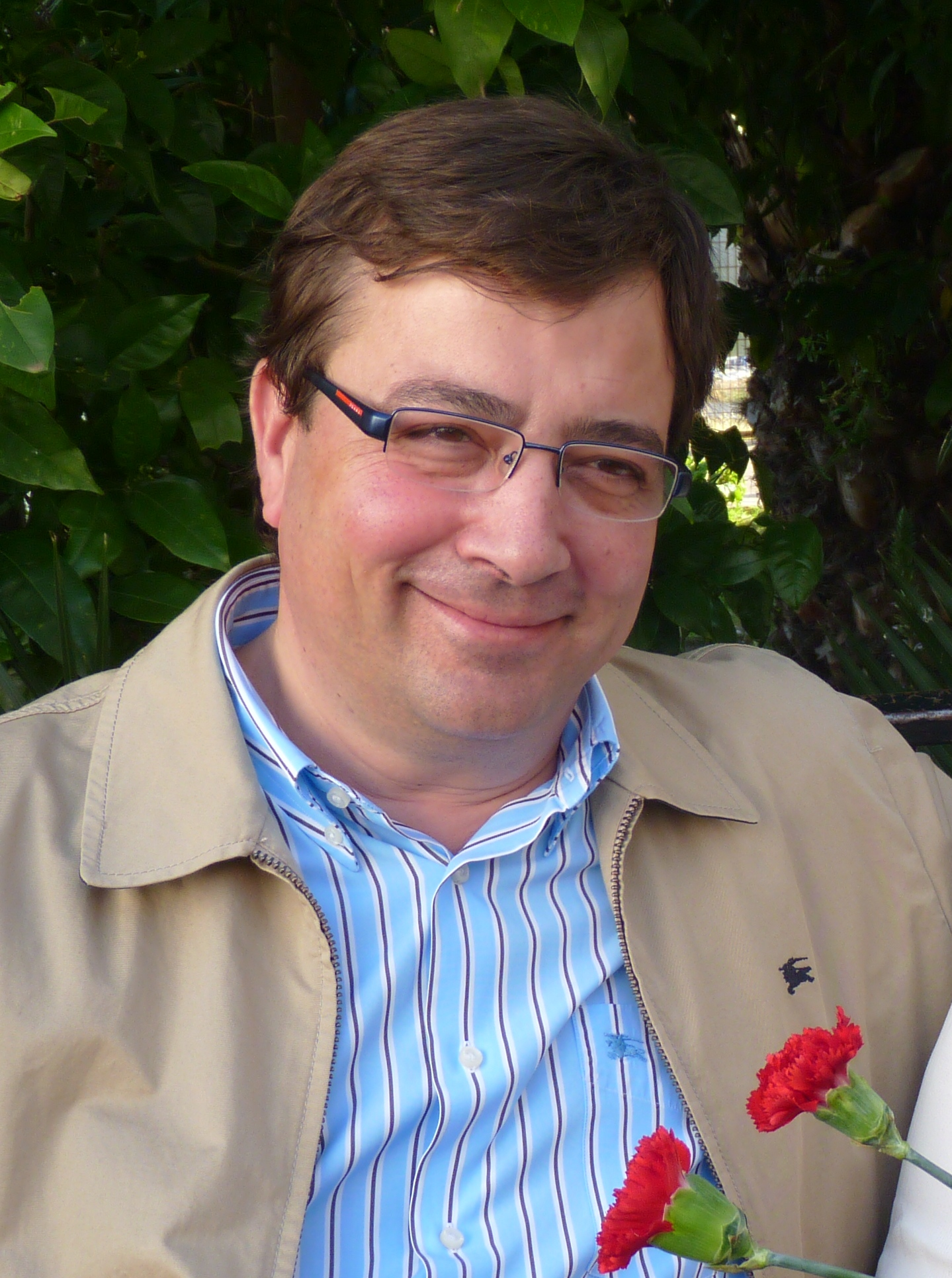 Con vecinos de Hornachos